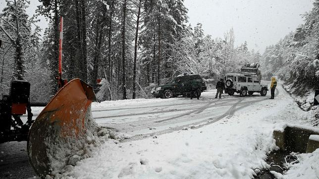 Puerto de Somosierra nevado